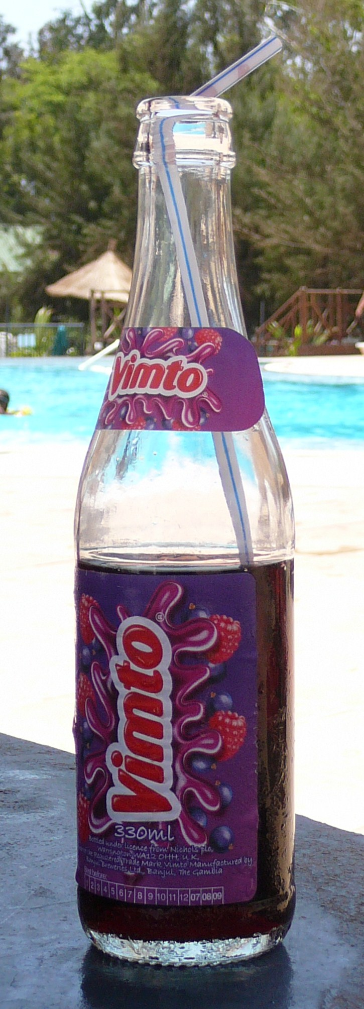 Vimto, von der Banjul Breweris